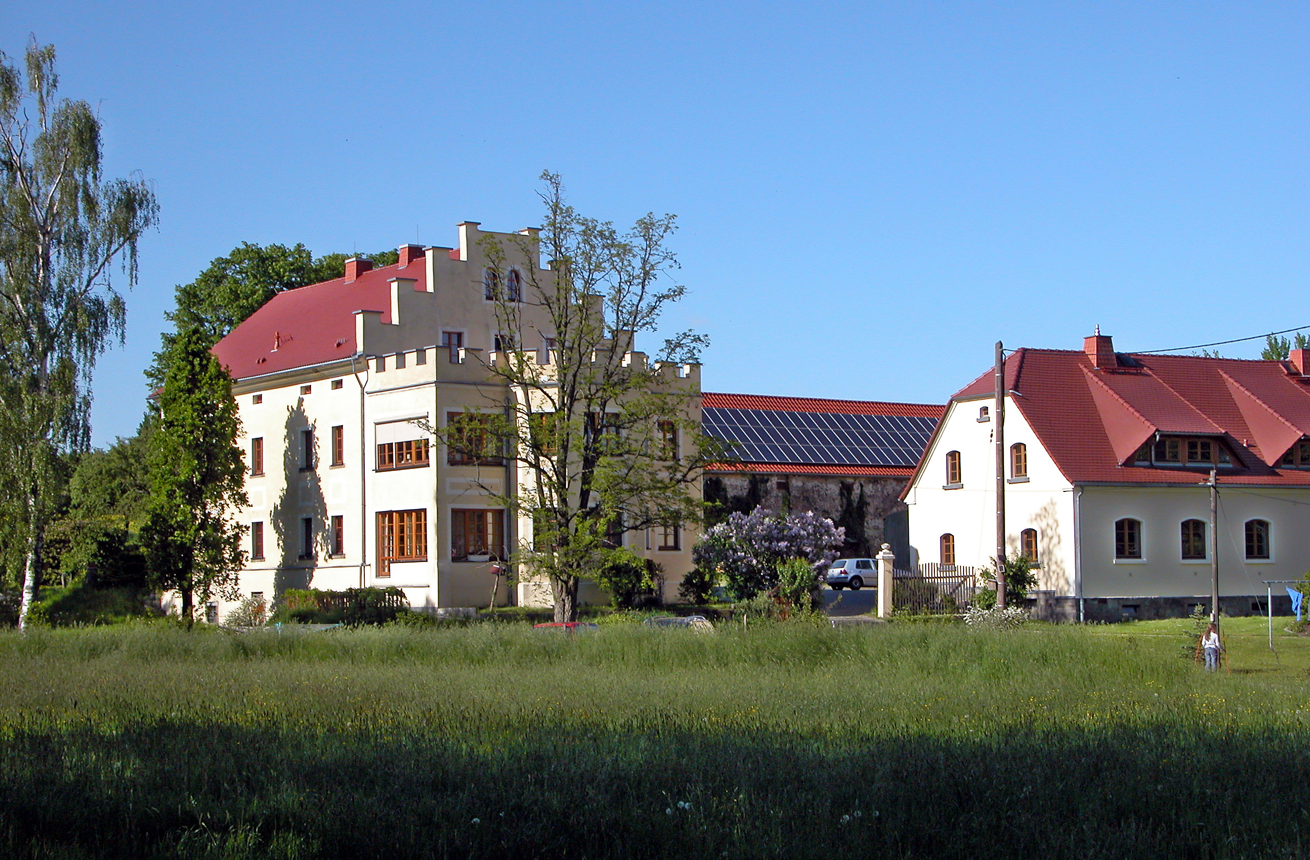 15.05.2015 01906 Oberburkau (zu Burkau): Rittergut Oberburkau, Herrenhaus, Hauptstr. 64. Ansicht von der Straße. (GMP: 51.176364,14.168222)[DSCN5775.JPG]20150515485DR.JPG(c)Blobelt